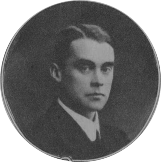 Regissör Harry Stangenberg 1919